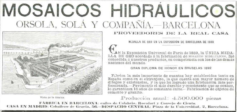 Anunci apareguta a "la ilustracion española y americana" el 22 de gener de 1894, sobre la fàbrica de paviments hidràulics Orsolá, Solá y cia.